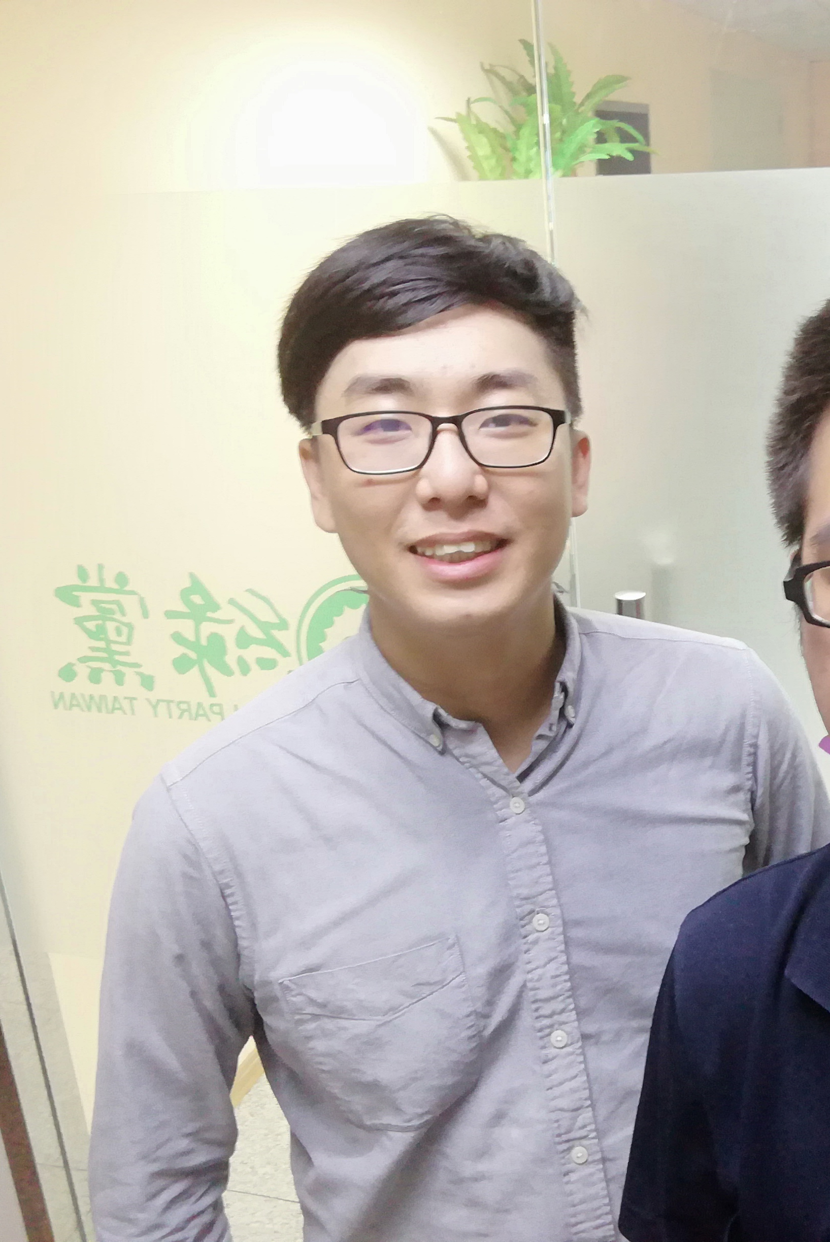 中文（台灣）: 劉崇顯照片，由維基嚮導 Igor(Yuriy_kosygin)於綠黨新竹黨部探討維基導遊提出無紙化旅遊所拍攝